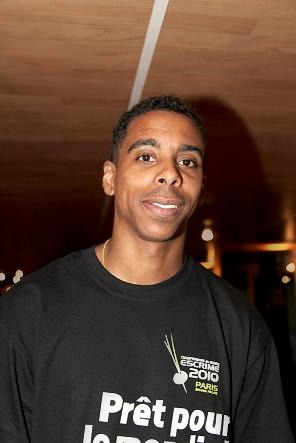 Jean Michel Lucenay peu avant le mondial d'escrime 2010 par Marine Andrieux pour